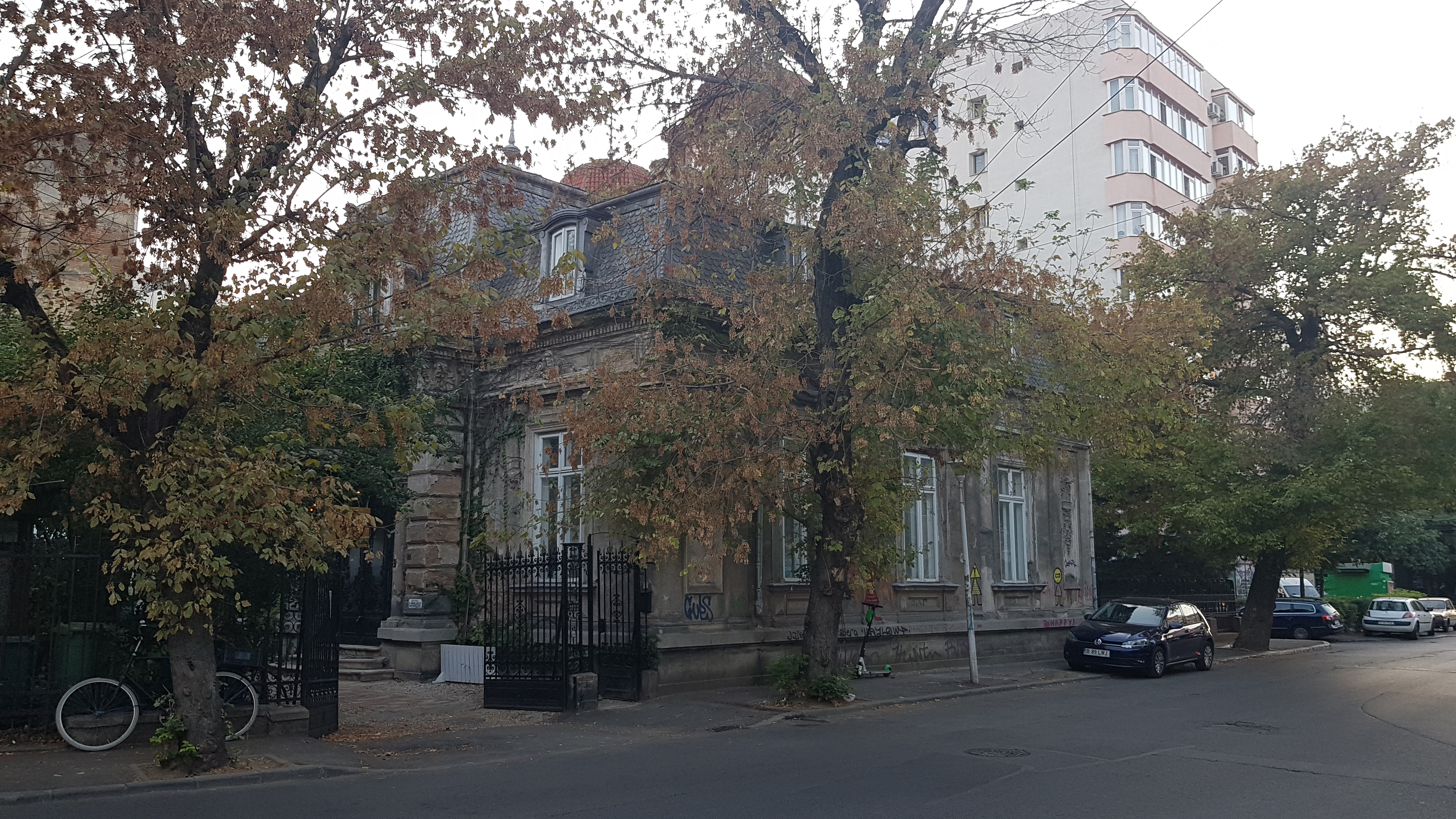 Casă, monument istoric